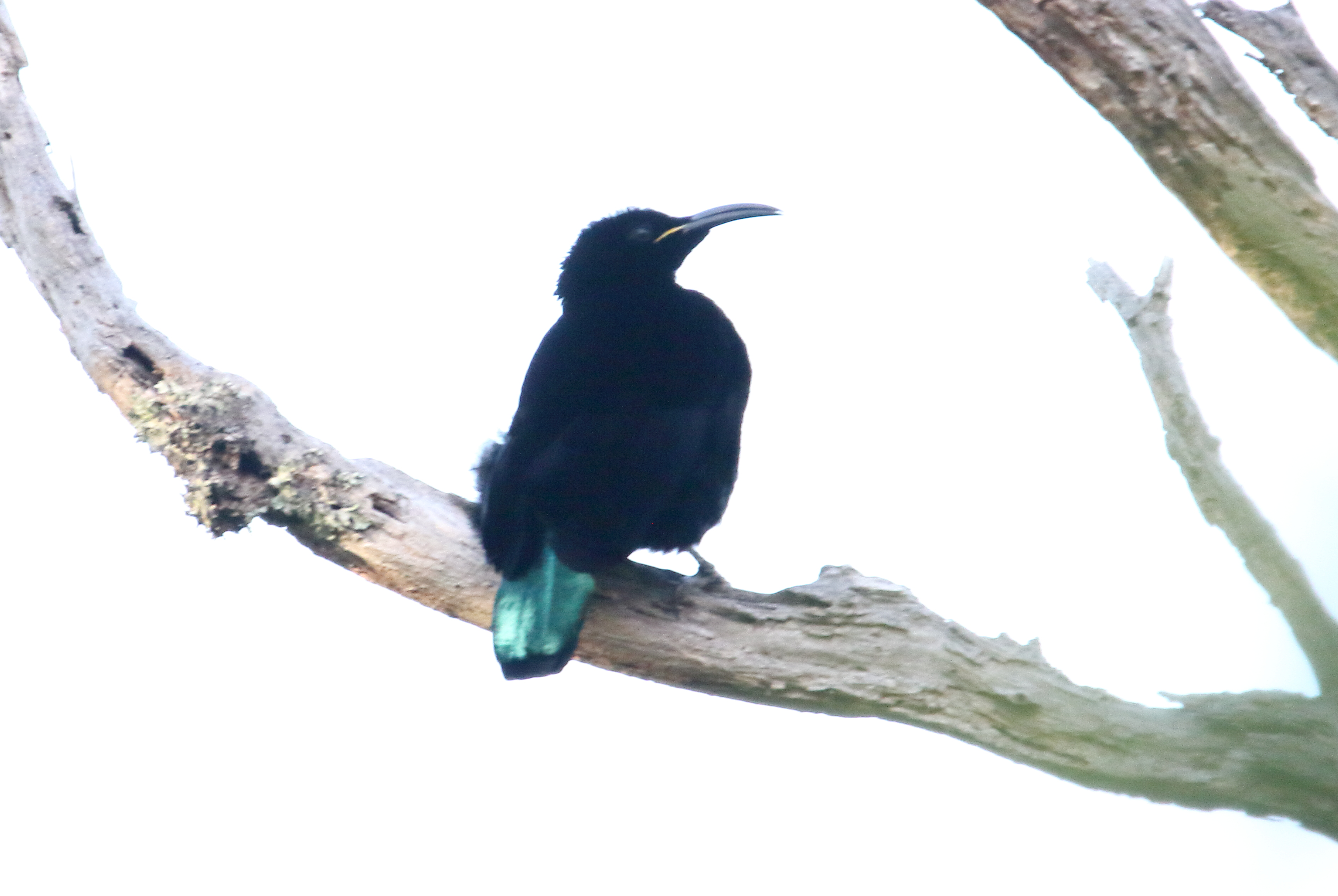 Paradise Riflebird (Ptiloris paradiseus)